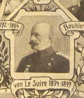 Günther von Le Suire (1846-1906), Bayerischer Adeliger und Generalmajor